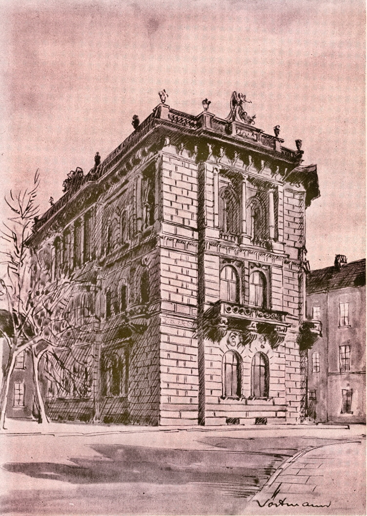 Sparkasse Bremen Obernstr.